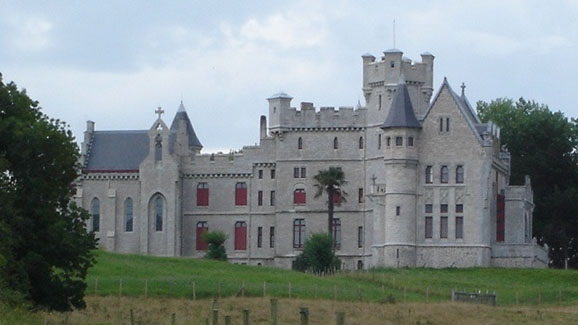 Photographie du chateau d'Abbadie.